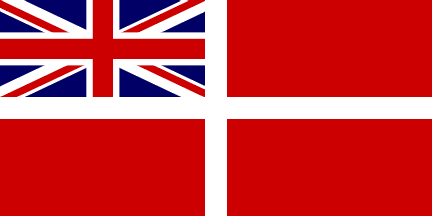 premier drapeau de la colonisation anglaise